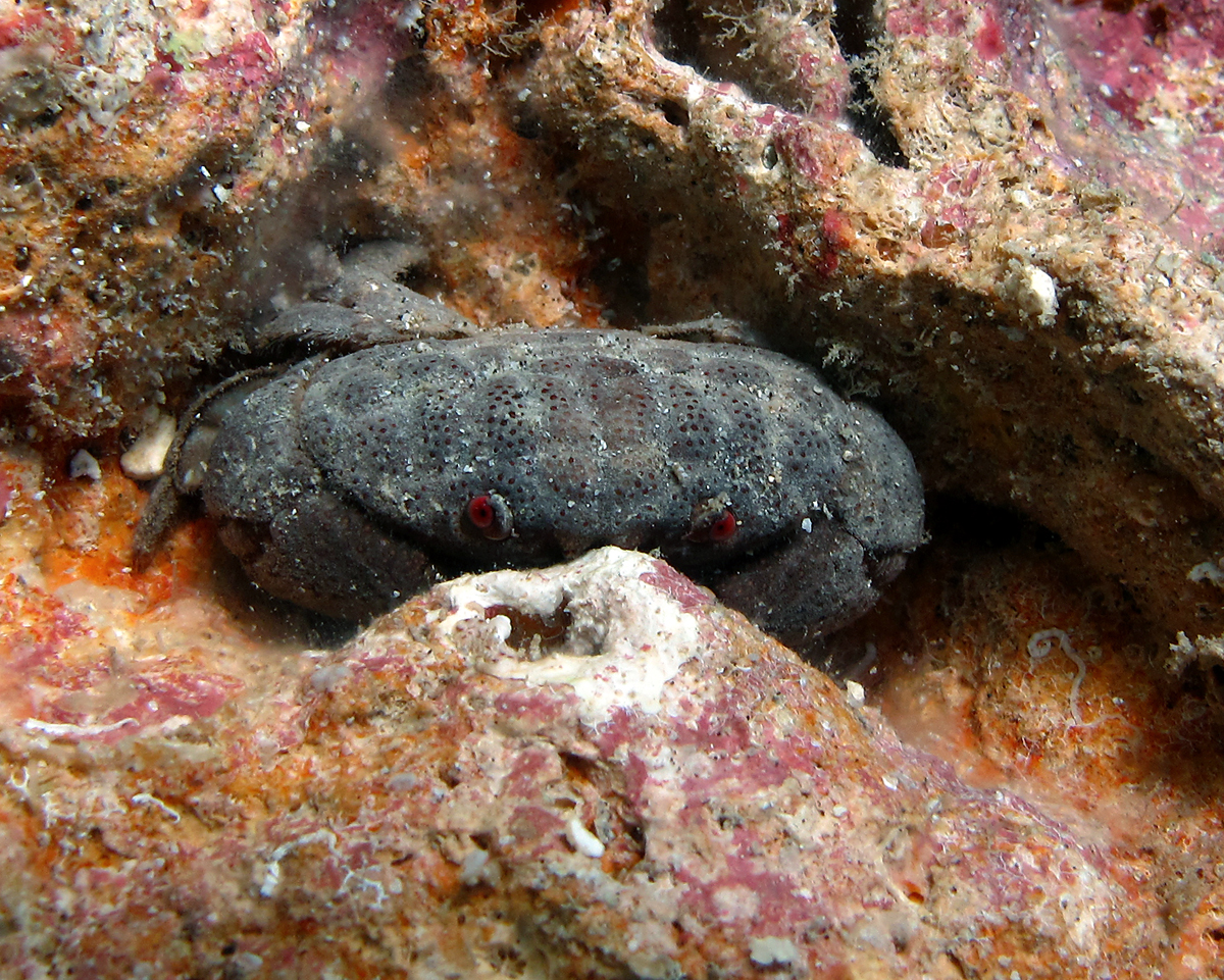 Le crabe Actaeodes tomentosus à la Réunion.